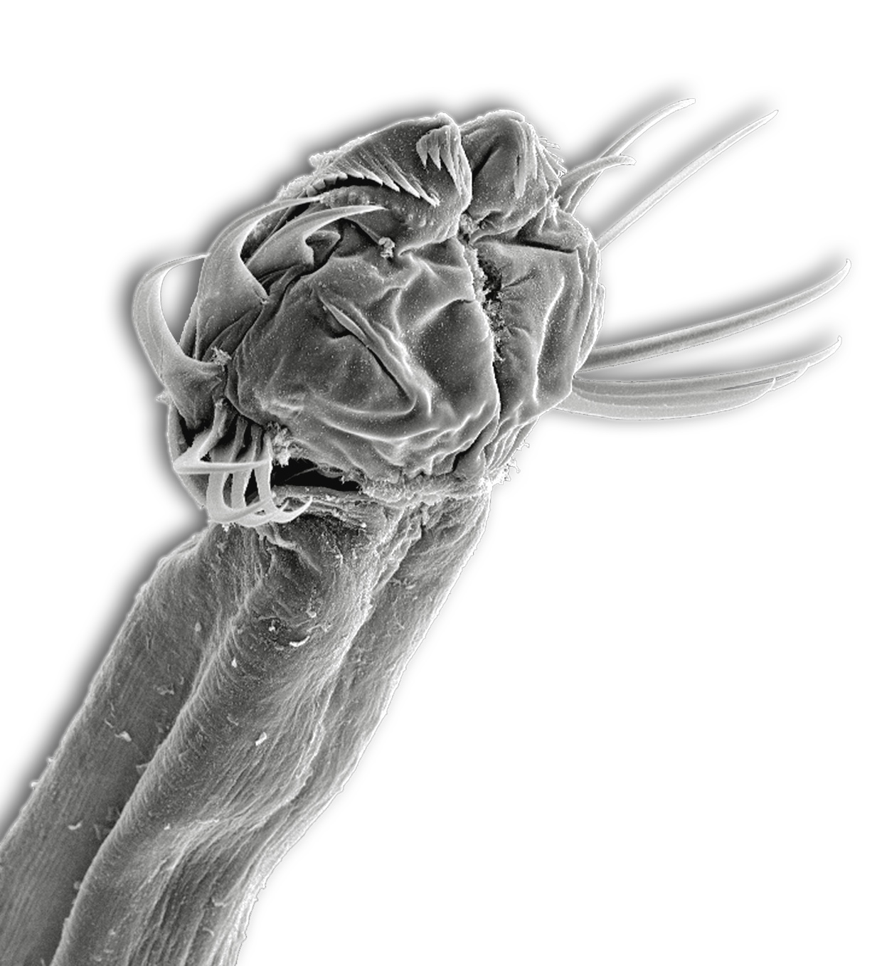 chaetognathe Sagitta sp.